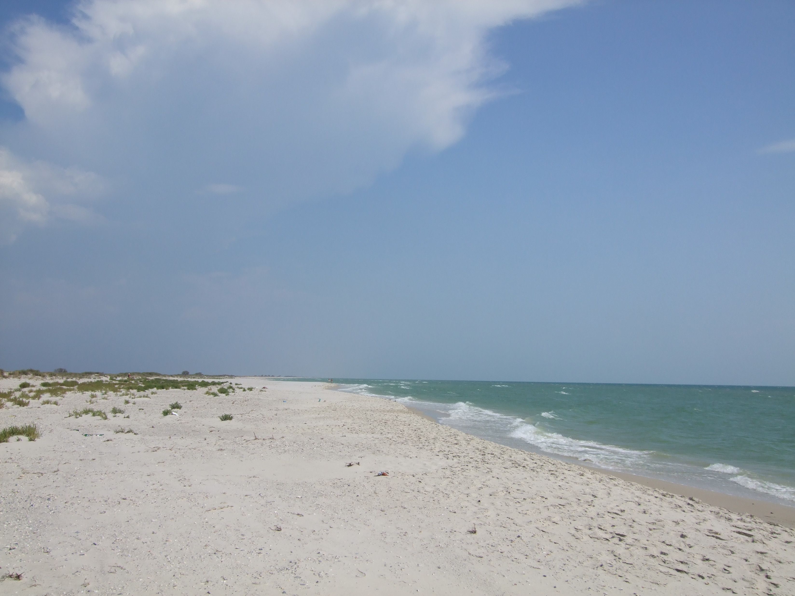 Dzhyralhach.JPG: Берег острова Джиралгач у Скадовському районі Херсонської області